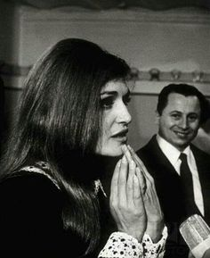 Dalida en 1967 au festival de Sanremo